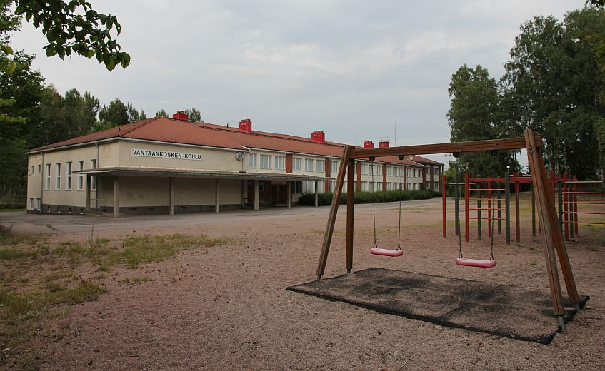 Vantaankosken koulua, joka sijaitsee Vantaalla Hämeenlinnanväylän ja Kehä III:n risteyksen luoteispuolella.